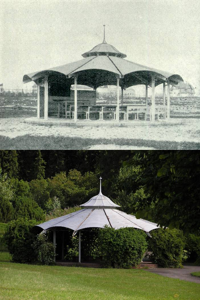 Botanical Garden in Berlin Native nameBotanischer Garten, Berlin-DahlemLocationBerlinCoordinates52° 27′ 18″ N, 13° 18′ 12.96″ E Established1899Website